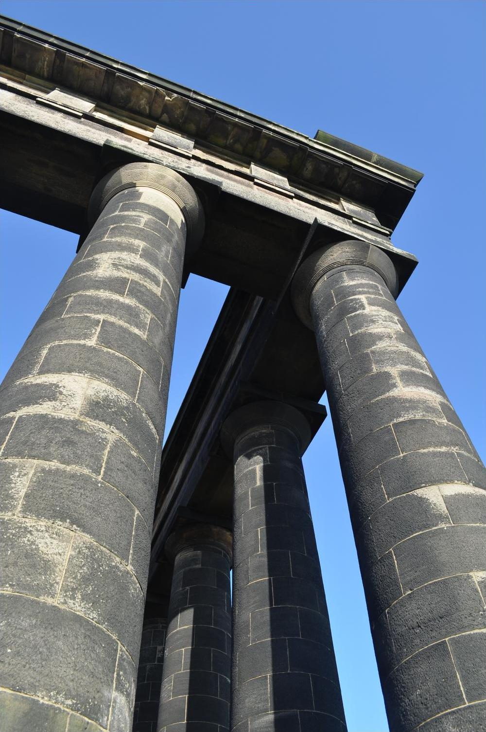 Detail